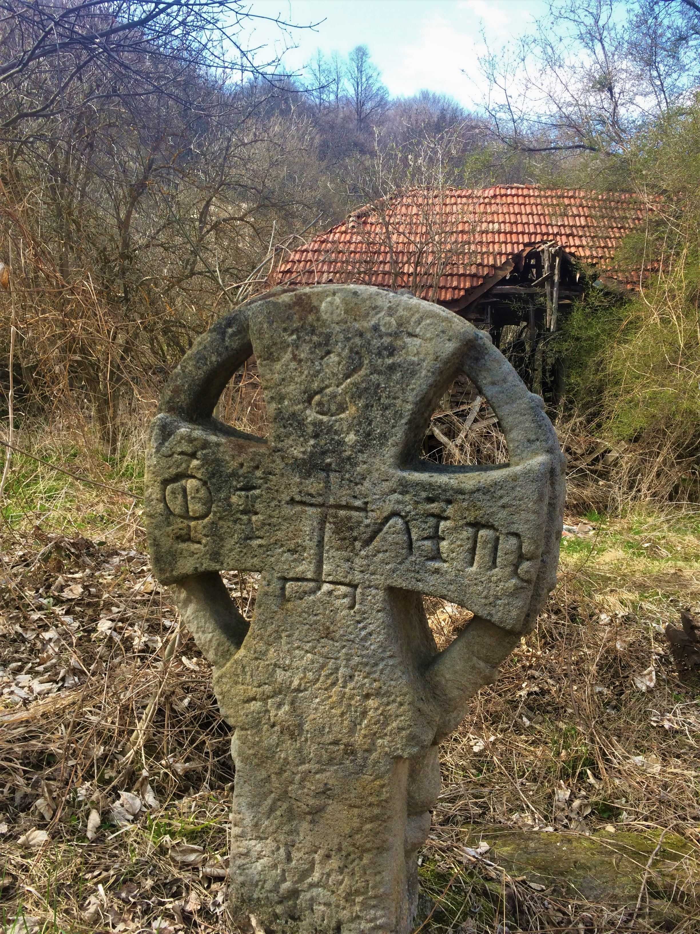 Каменен надробен камък в Маломаловски Манастир Св. Никола